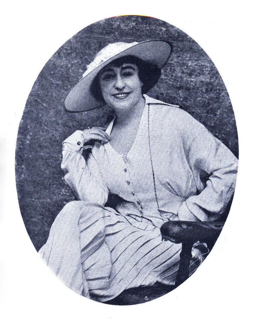 Gianna Terribili Gonzales